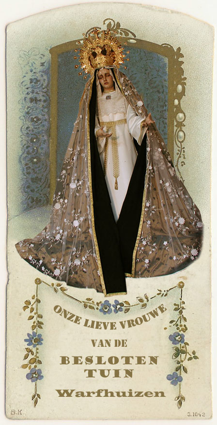 Prentje van het Mariabeeld in de Warfhuister kluiskerk zelf gemaakt